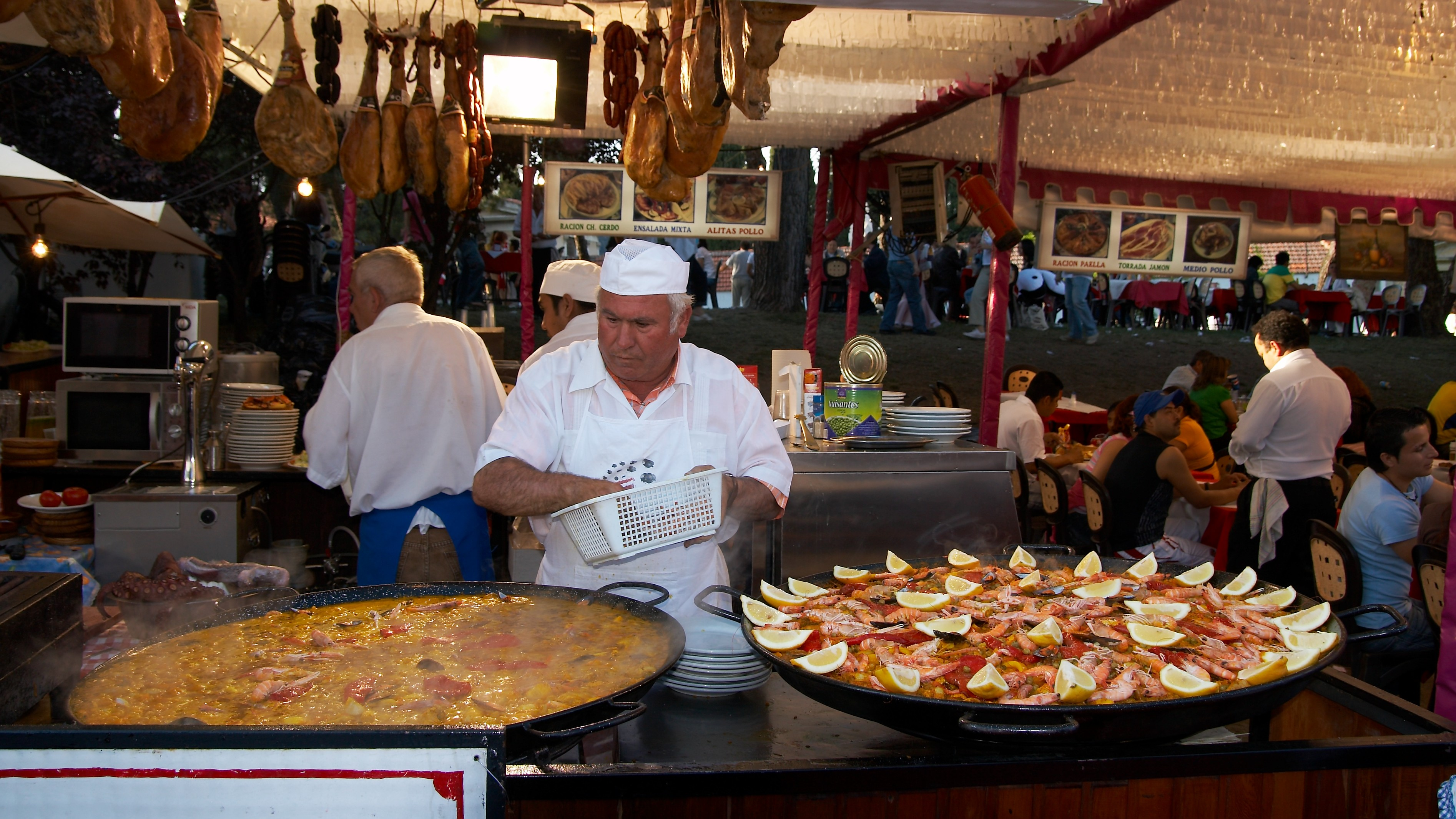 Paella. Fiestas de San Isidro 2007, Madrid, España.